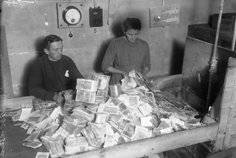 Die staatliche Vernichtung des Papiergeldes. Durch die Einführung der Rentenmark wird das überflüssige Papiergeld zentnerweise pro Tag vernichtet. Die Vernichtungsmachine, rechts der Spalt, wo durch Wasserdampf und Messer das Papiergeld vollständig zermalmt wird.